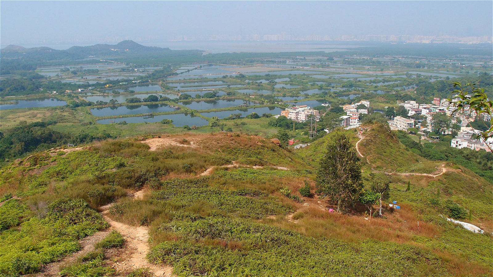 中文（香港）: 髻山的北脊，攝於山頂